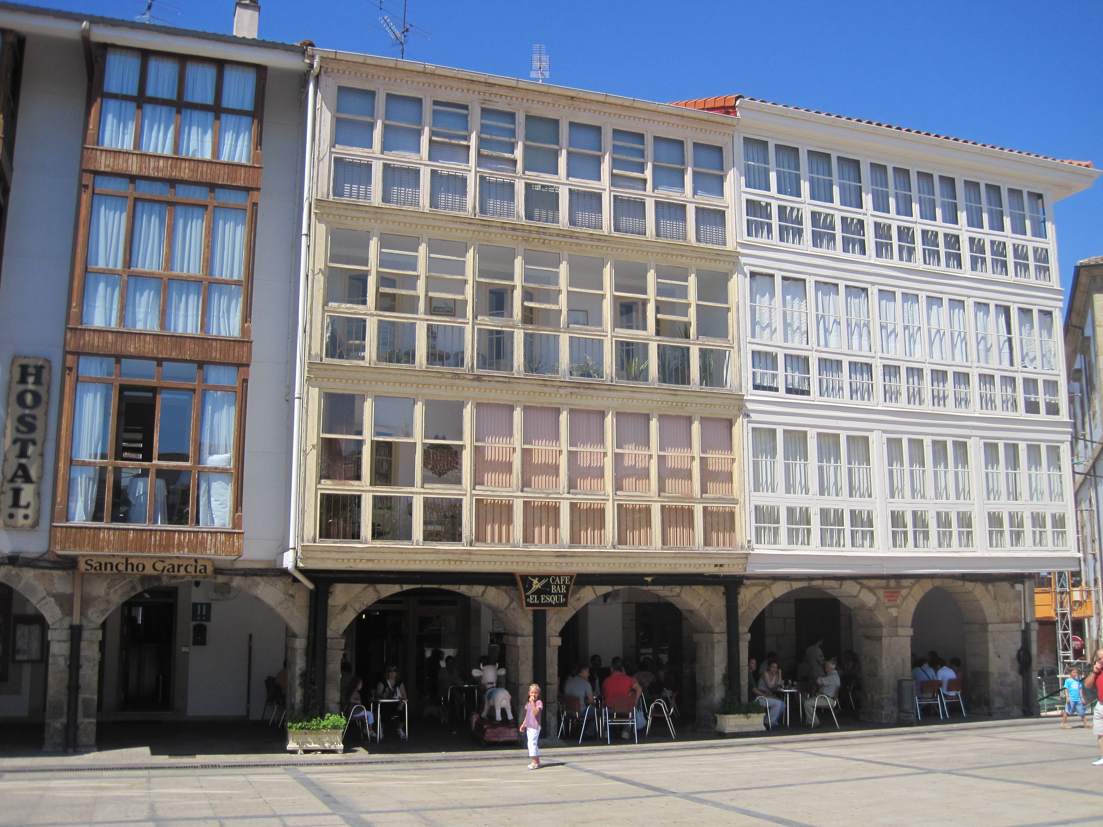 Edificios tradicionales de Espinosa.